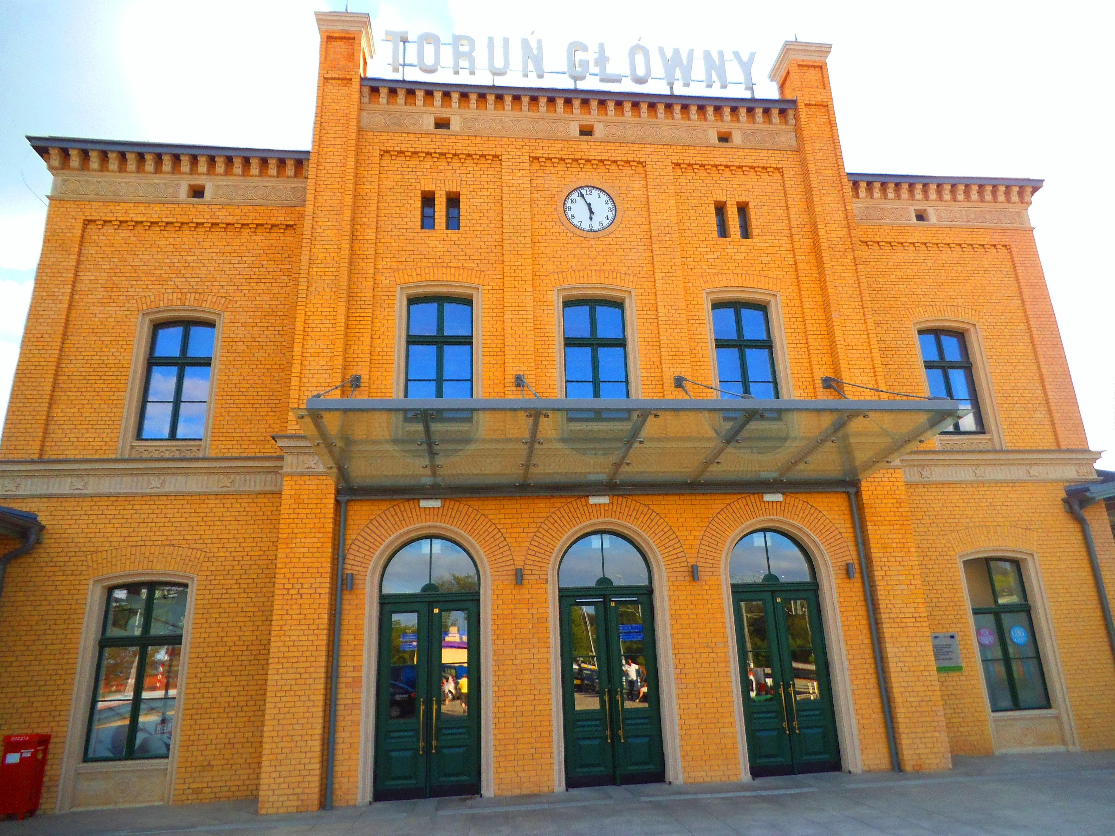 Budynek główny dworca Toruń Główny